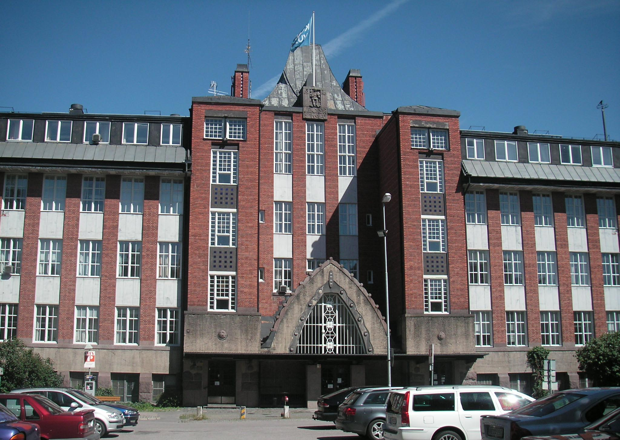 S:t Olofskolan, Norrköping, Sweden. Architect Carl Bergsten, built 1906-1907